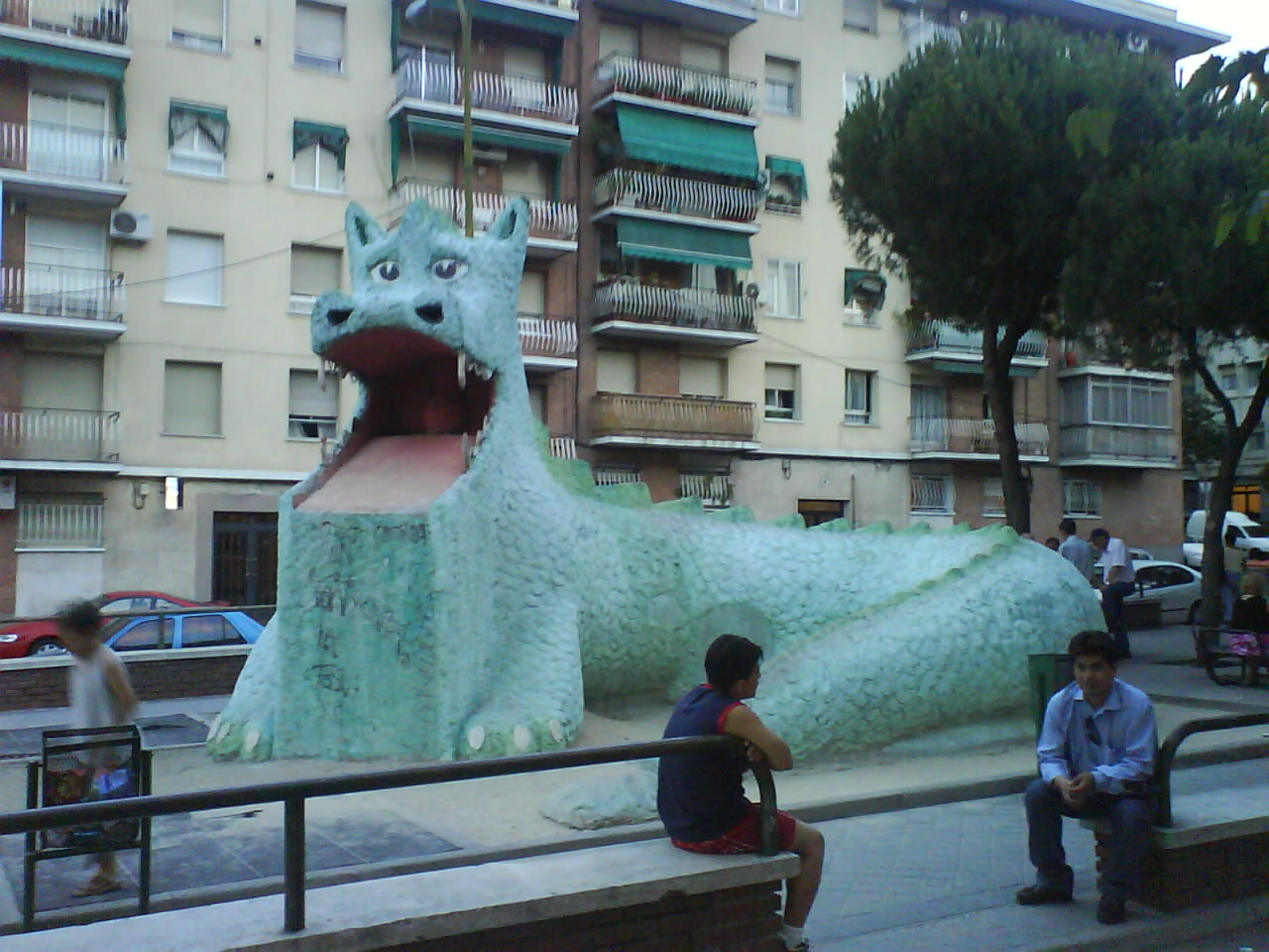 Dragón de La Elipa, símbolo del Barrio. Madrid (España). Calle marqués de Corbera.